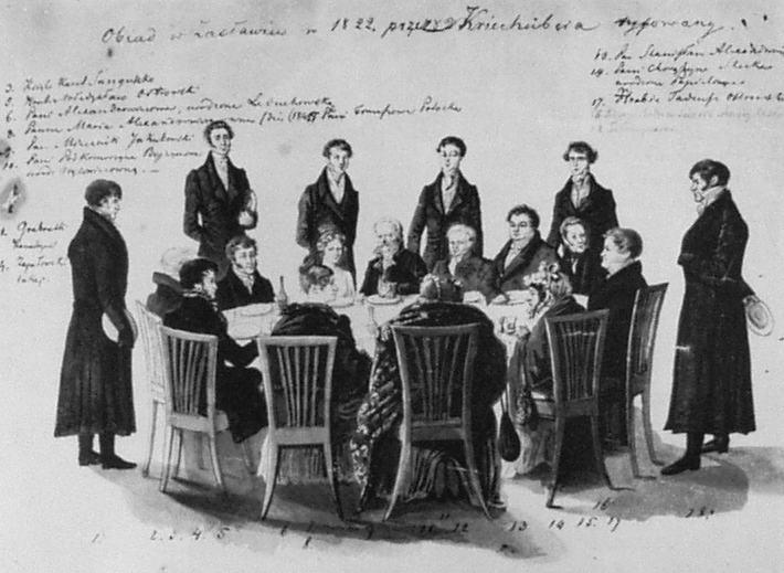 Папір, акварель. 3. Князь Карл Санґушко 5. Граф Владислав Островський 6. Пані Александровичева вроджена Ледухівська 8. Панна Марія Александрівна /на/1845/ Пані Томашова Потоцька 9. Пан Мечник Якубовський 10. Пані підкоморна Бейзимова вроджена Вансовичівна 13. Пан Станіслав Александрович 14. Пані Хорунжівна Стецька / вроджена Попелівна 17. Граф Тадеуш Островський 18. Ґодфрид Радзимінський хорунжий заславський 19. Толочинський Серед прислуги, яка стоїть за кріслами товариства: 1. Грабовський /камердинер/ 2. Запаловський /льокай/